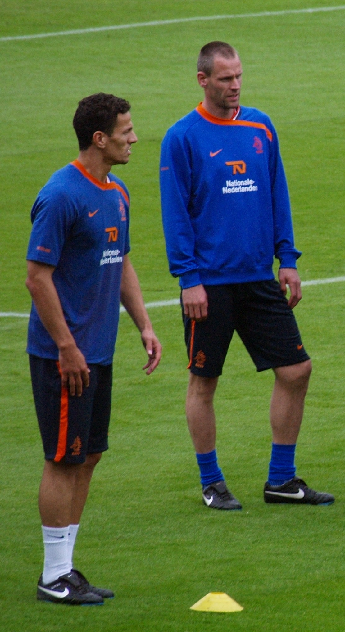 Khalid Boulahrouz and André Ooijer